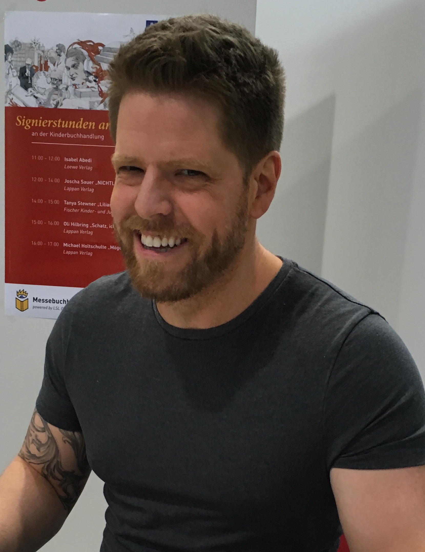 Joscha Sauer bei einer Autogrammstunde auf der Leipziger Buchmesse 2016.